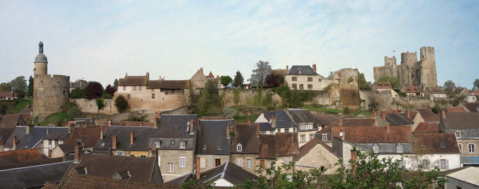 Panorama de Bourbon-l'Archambault, Auvergne, France.